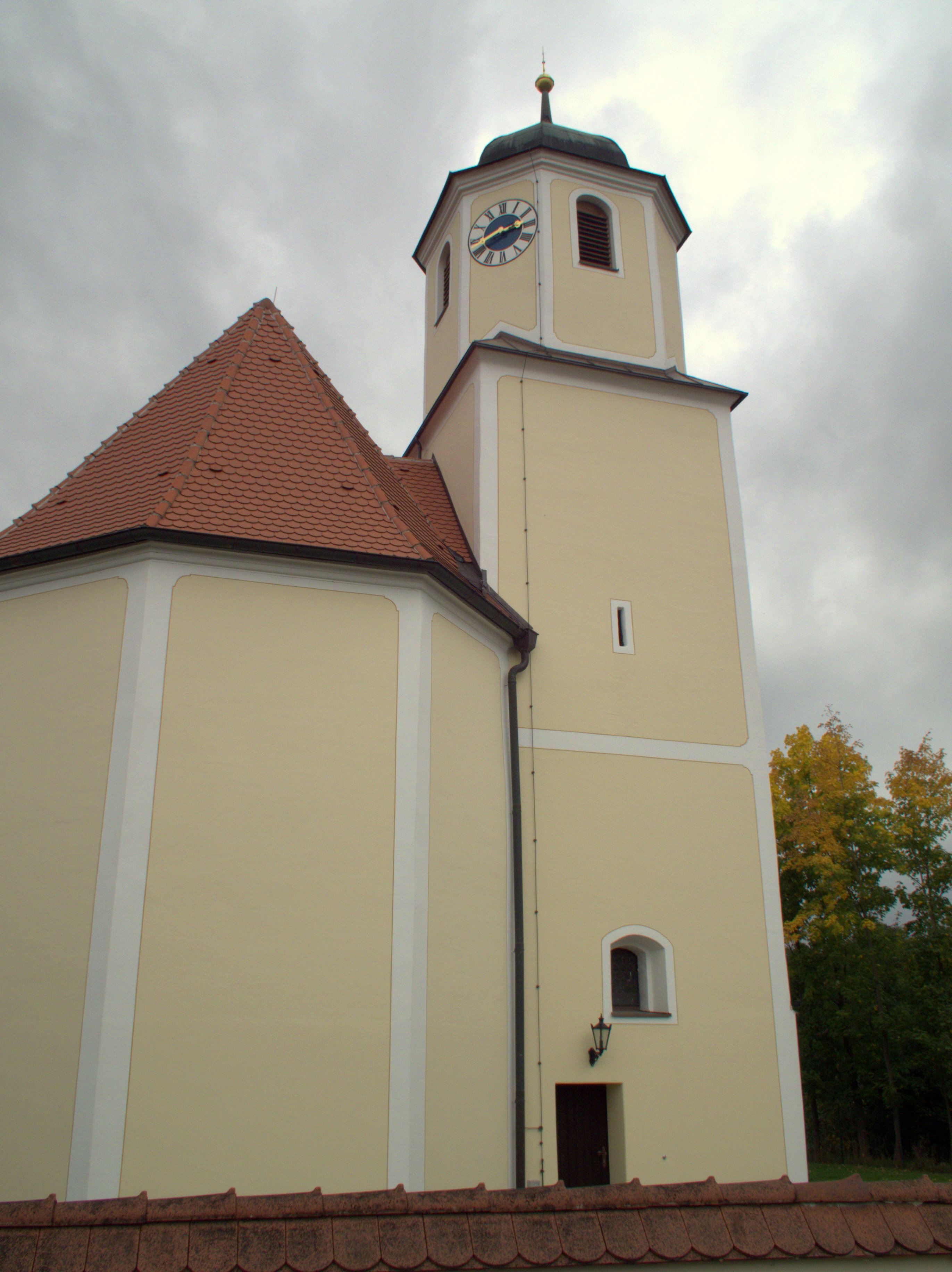 Die katholische Filialkirche St. Maria und Margareta in Deusmauer, Ortsteil der Oberpfälzer Stadt Velburg